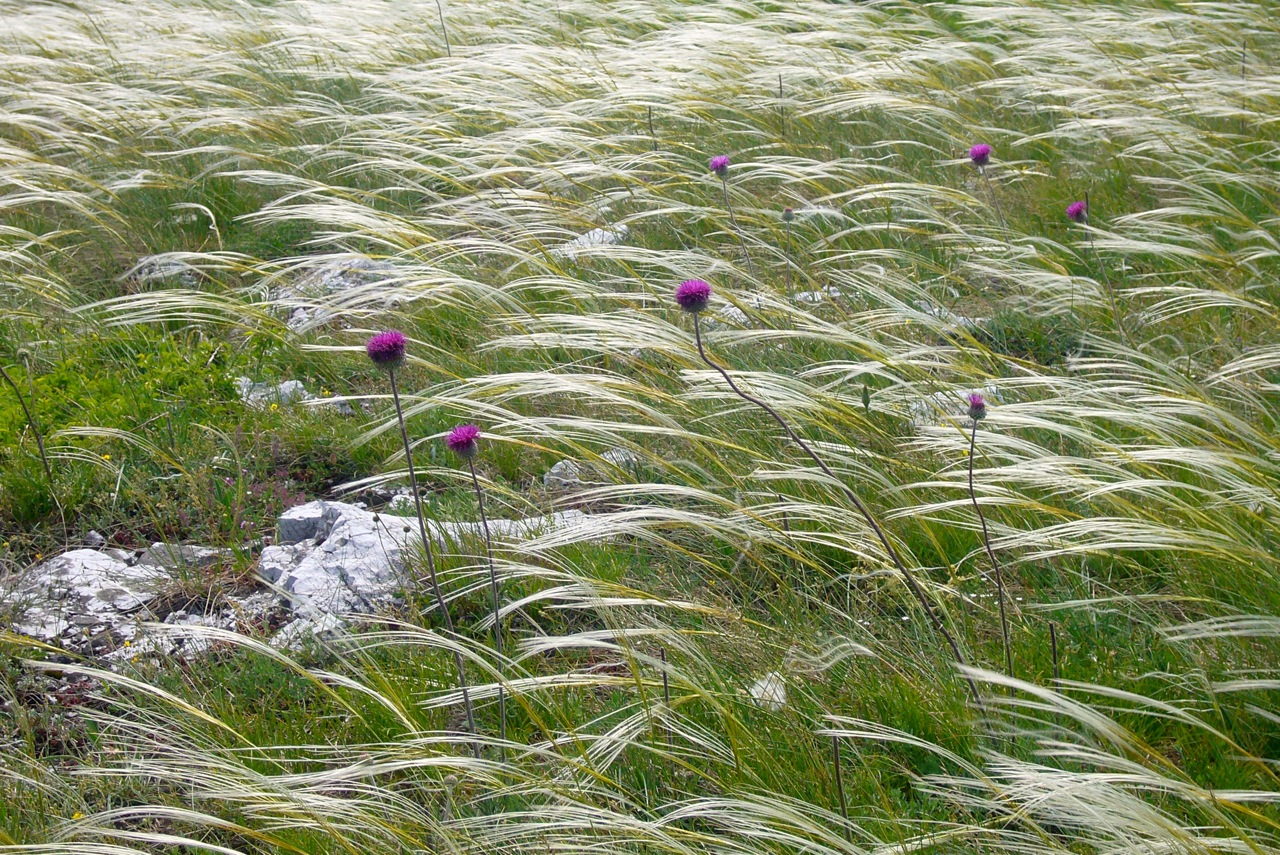 Graswellen